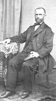 Der Lehrer und Abgeordnete Julius Ostendorf (1823-1877)